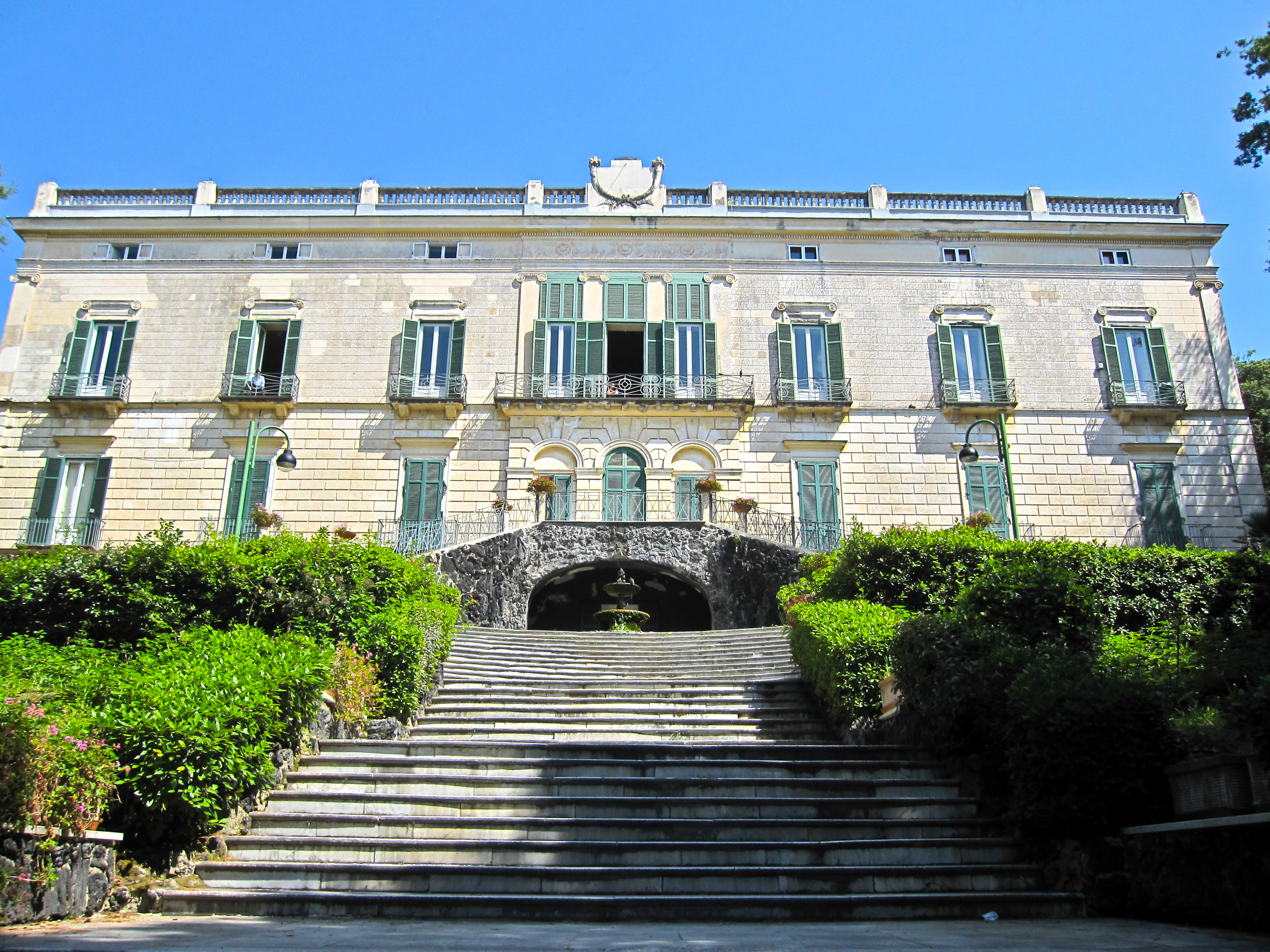 Villa floridiana, Napoli. La facciata sud rivolta verso il mare.